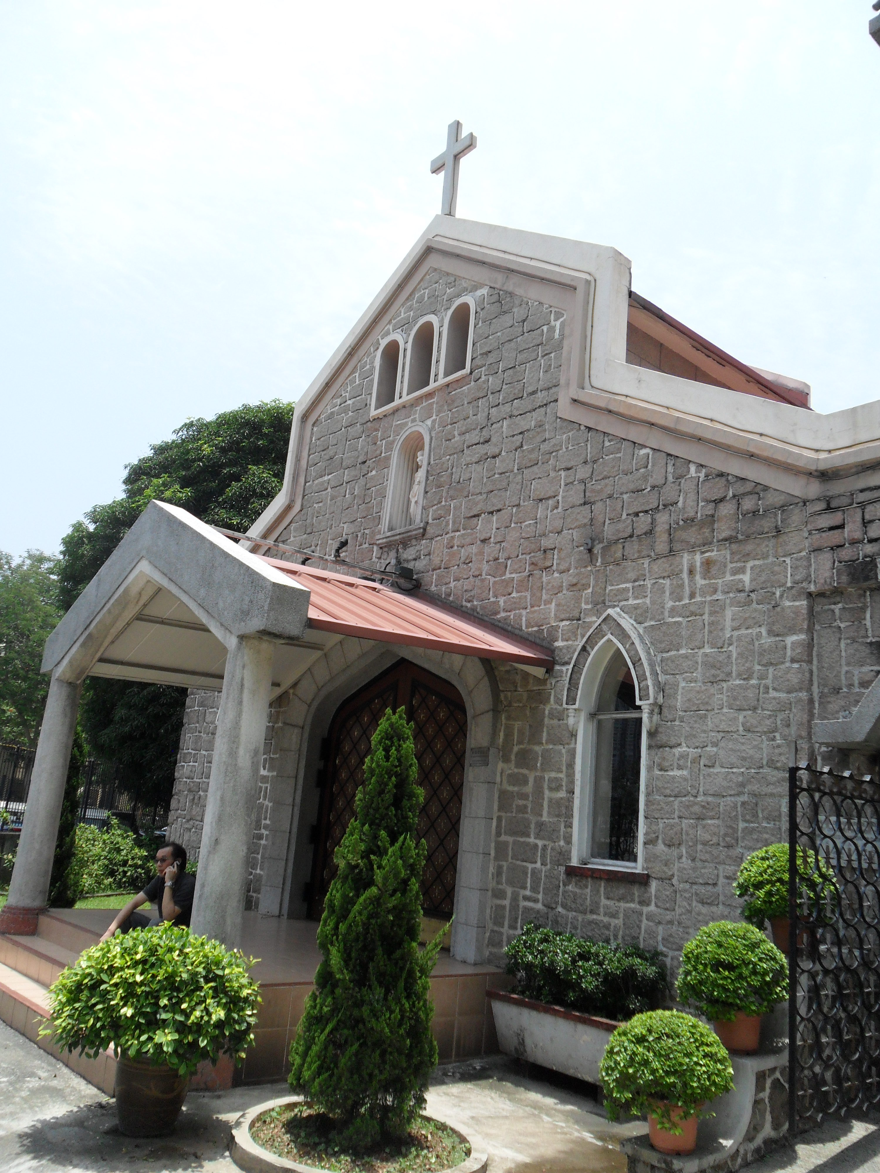 中文（香港）: 粉嶺聖若瑟堂外貌, 香港, 中國